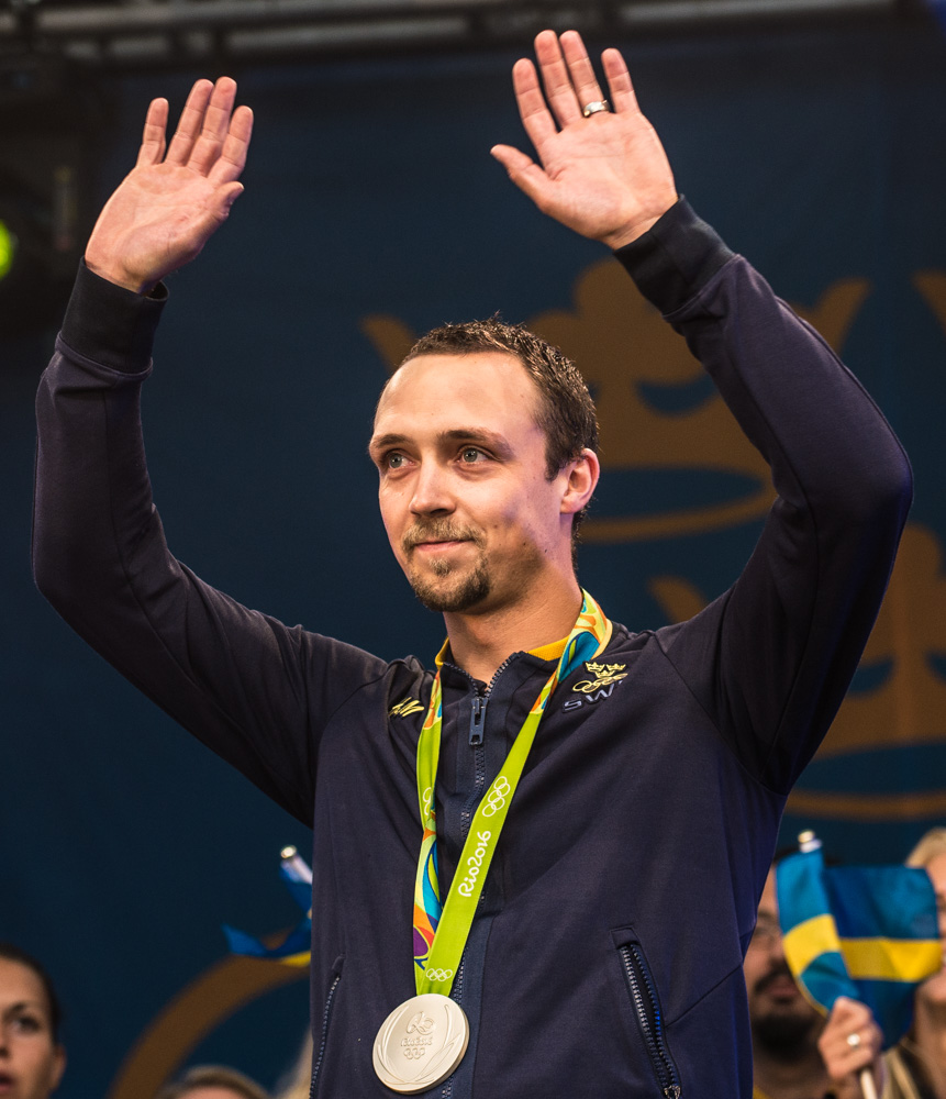 Marcus Svensson hyllas i Kungsträdgården i Stockholm den 21 augusti 2016 tillsammans med övriga OS-medaljörerna från Rio-OS.